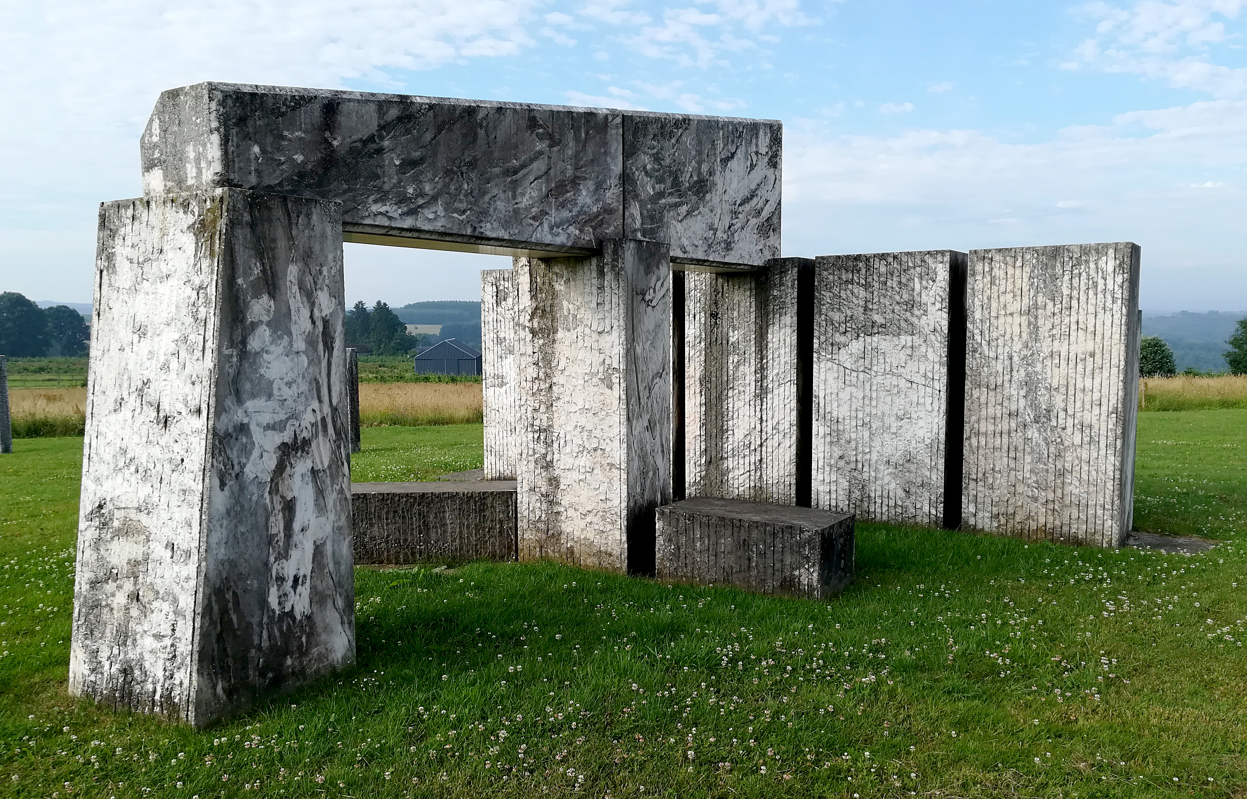 Europaliamonument 1991, Nadrin